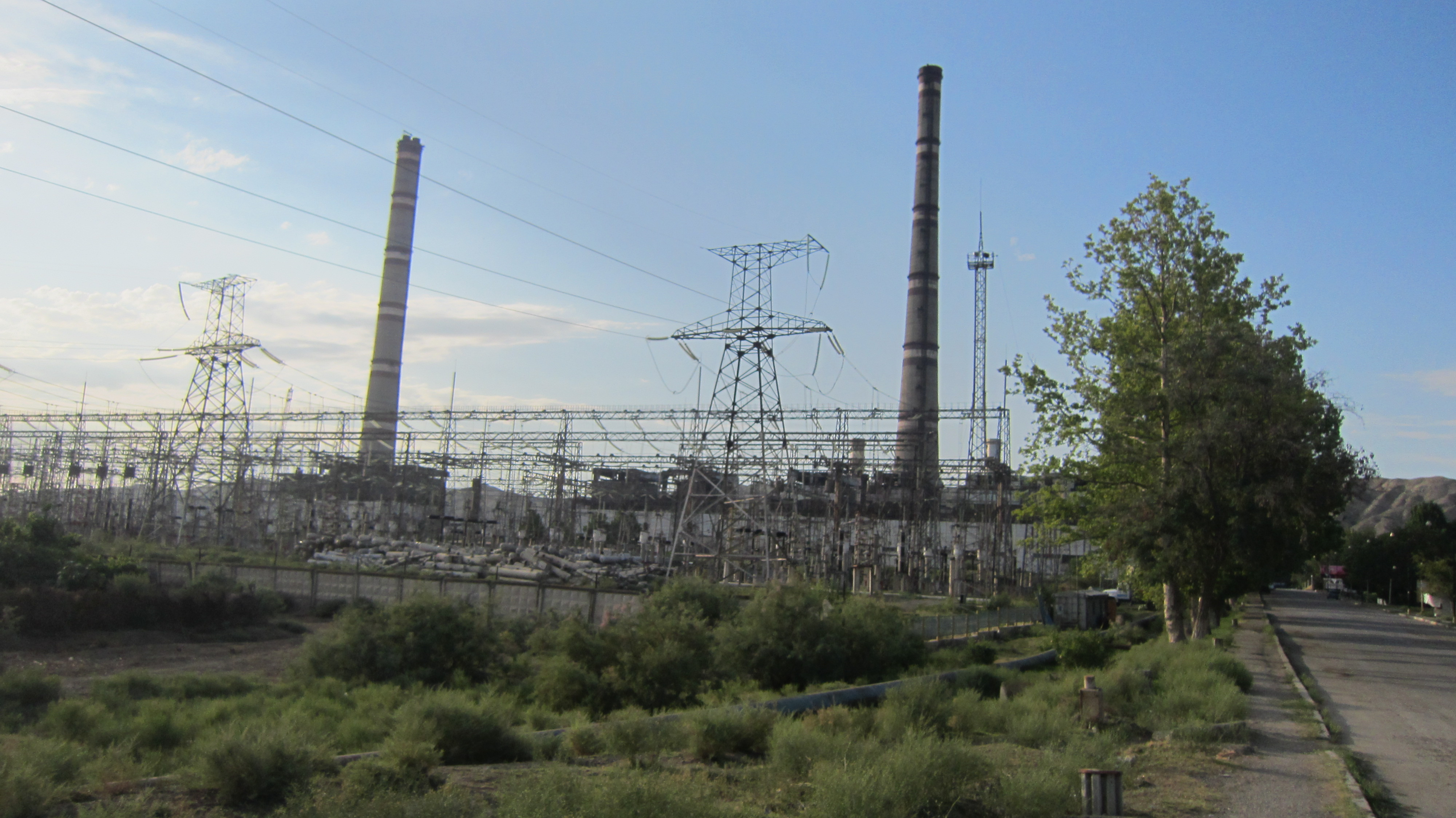 Azərbaycan İES